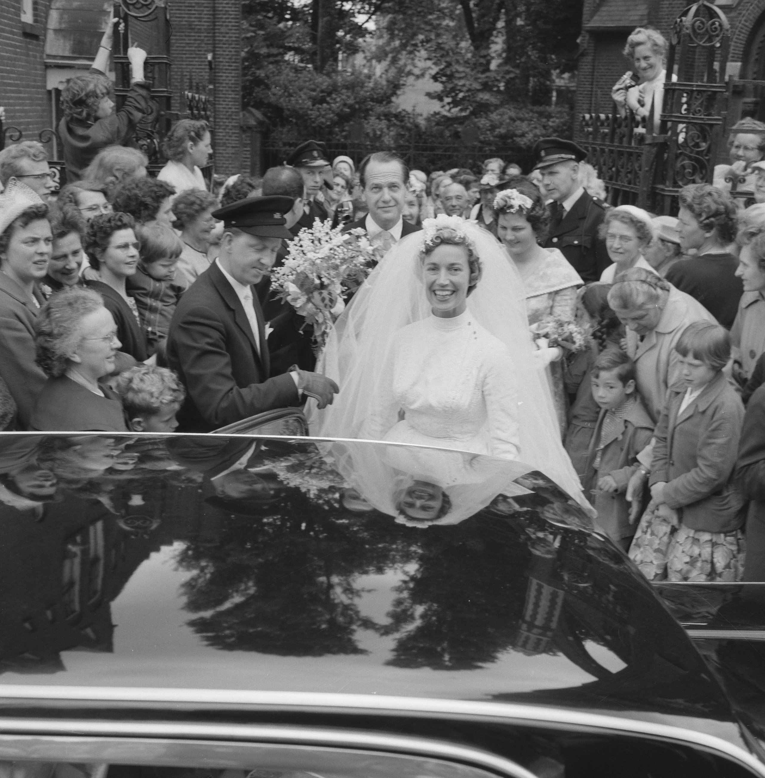 Collectie / Archief : Fotocollectie Anefo Reportage / Serie : [ onbekend ] Beschrijving : Huwelijk van Hannie Lips en Henk Scholten te Rotterdam Datum : 28 mei 1960 Locatie : Rotterdam, Zuid-Holland Trefwoorden : huwelijken Persoonsnaam : Lips, Hannie, Scholten, Henk Fotograaf : Behrens, Herbert / Anefo Auteursrechthebbende : Nationaal Archief Materiaalsoort : Negatief (zwart/wit) Nummer archiefinventaris : bekijk toegang 2.24.01.03 Bestanddeelnummer : 911-2857